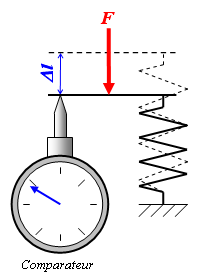 Principe d'un dynamomètre Auteur : Bertrand Coconnier, réalisé avec Word + Paint. Licence GFDL Bertrand Coconnier